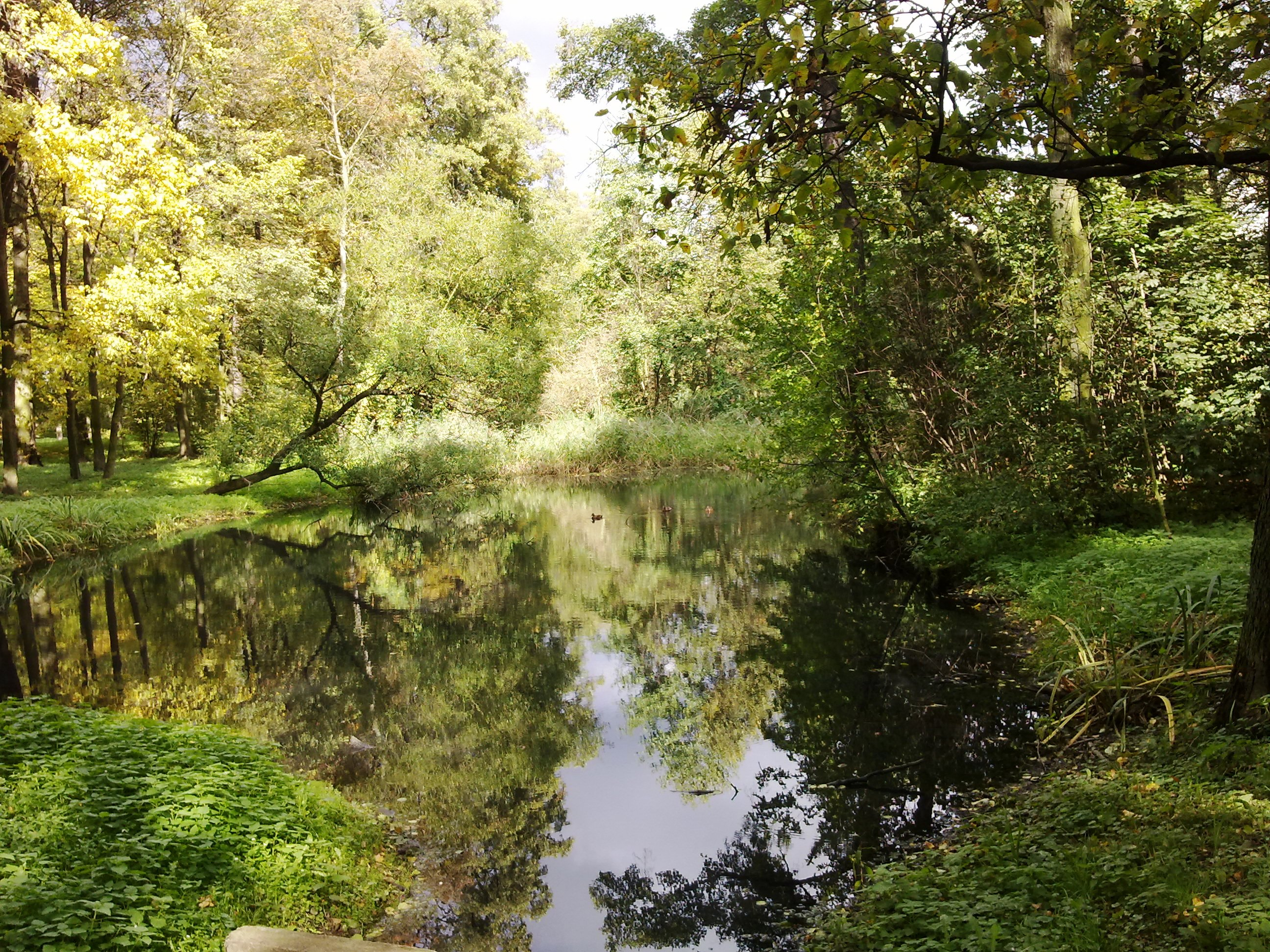 Łask, ul. Objazdowa - Park dworski, obecnie park miejski im. Rodu Łaskich (zabytek nr rejestr. 386 z 25.06.1990)